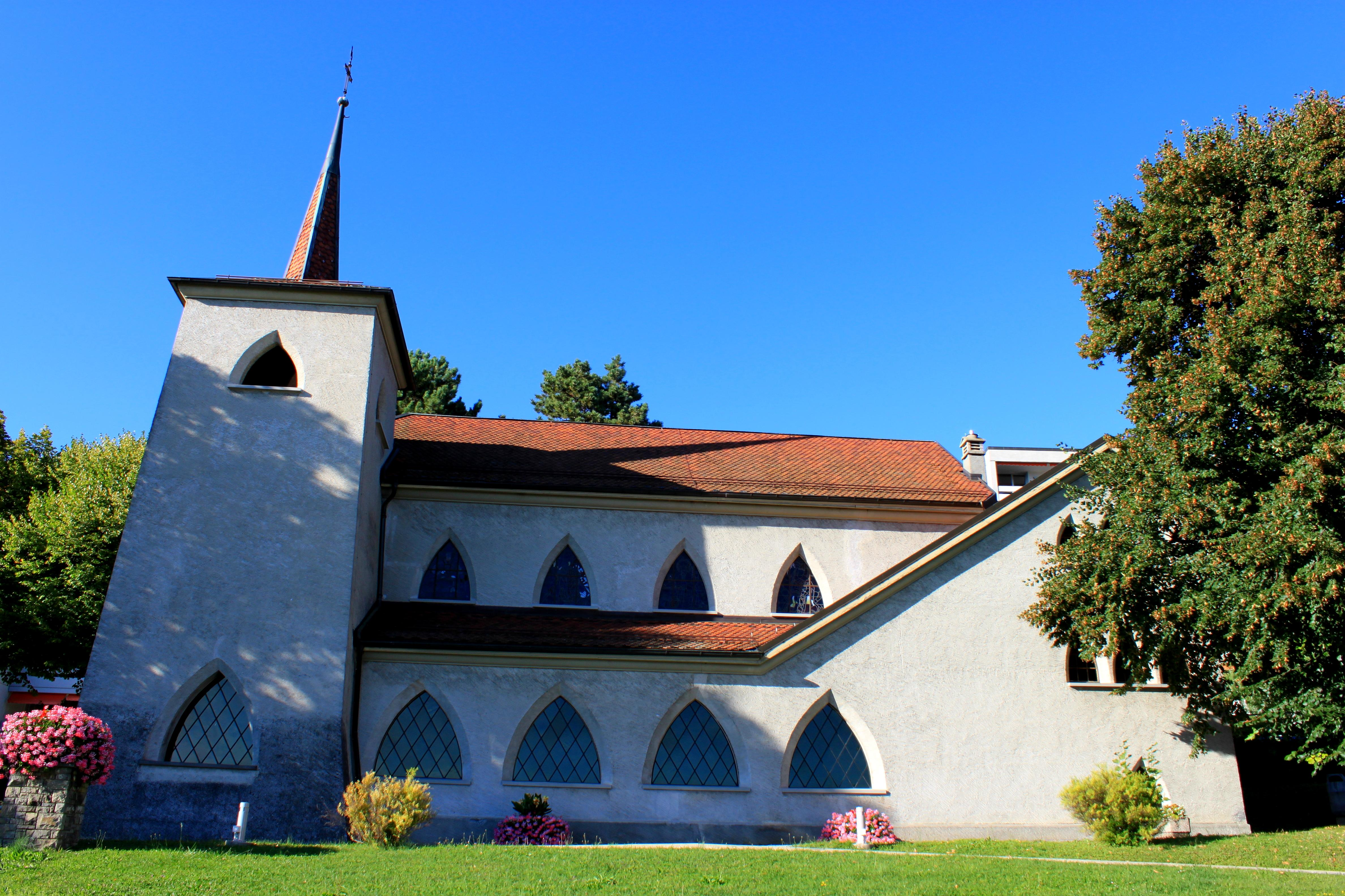 Suisse, canton de Vaud, Lutry, Eglise catholique Saint-Martin.